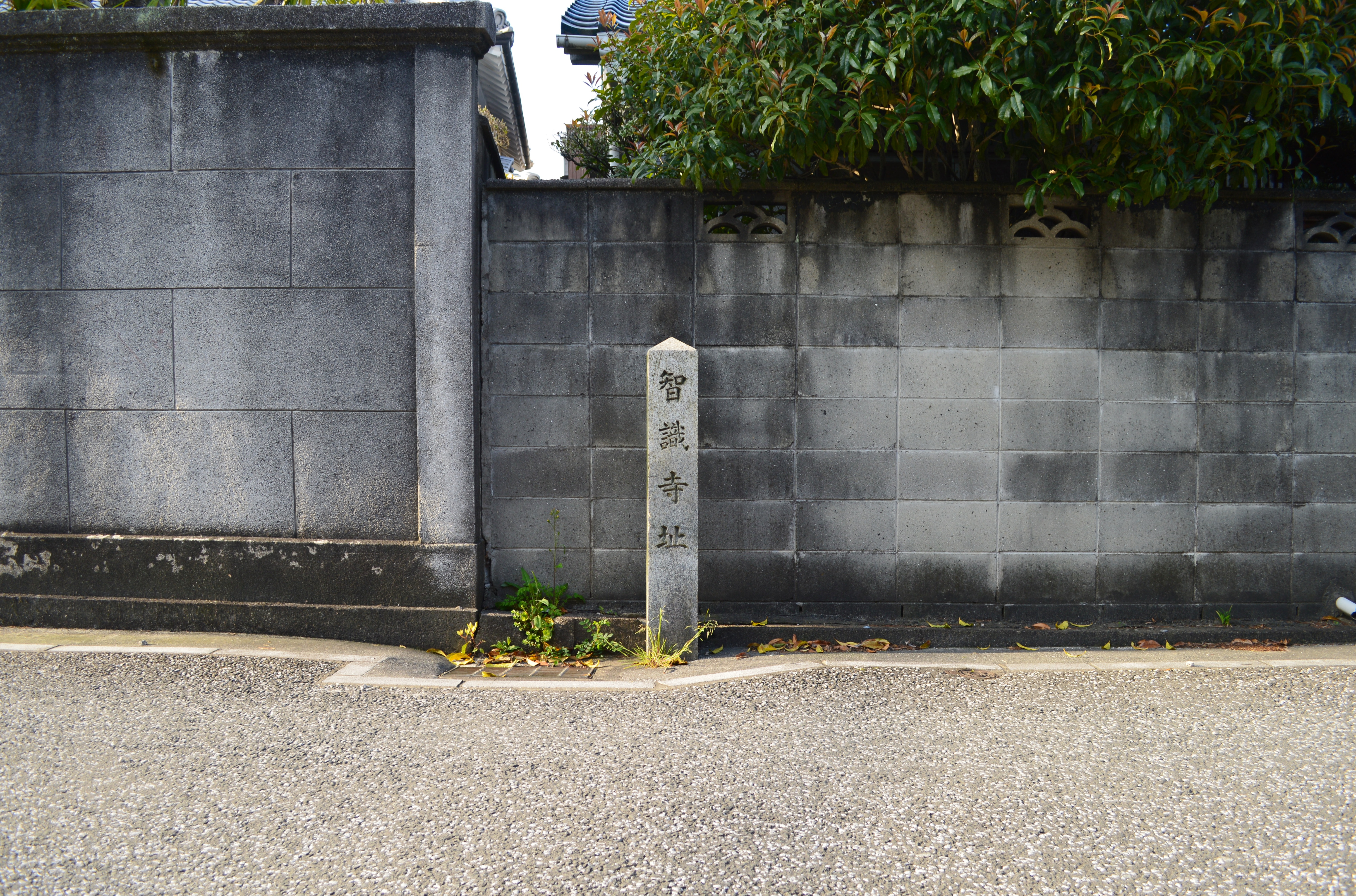 智識寺跡 (柏原市) 石碑